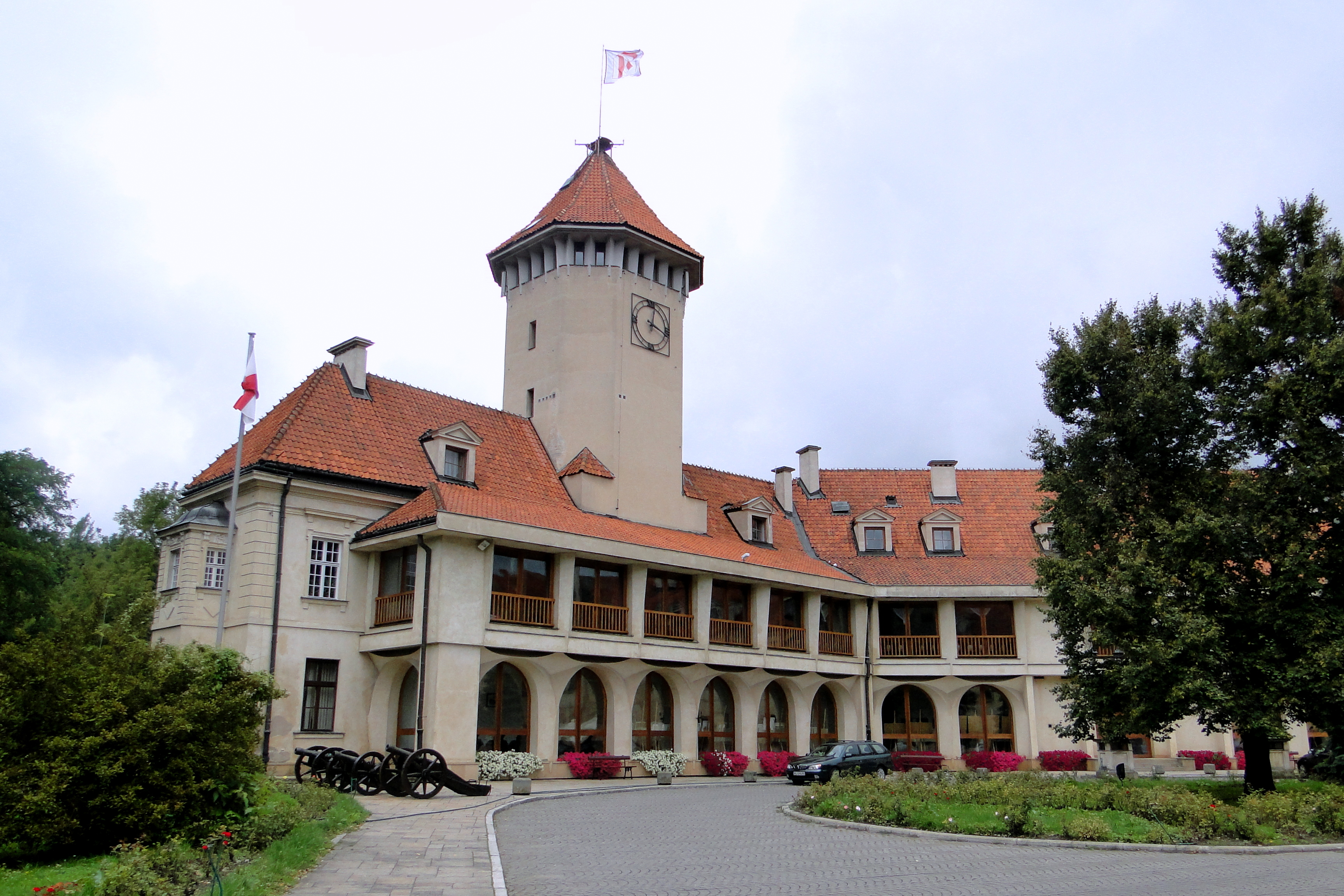 Pułtusk - zespół zamku biskupiego, XIV-XIX, XX w. (zabytek nr A-106)